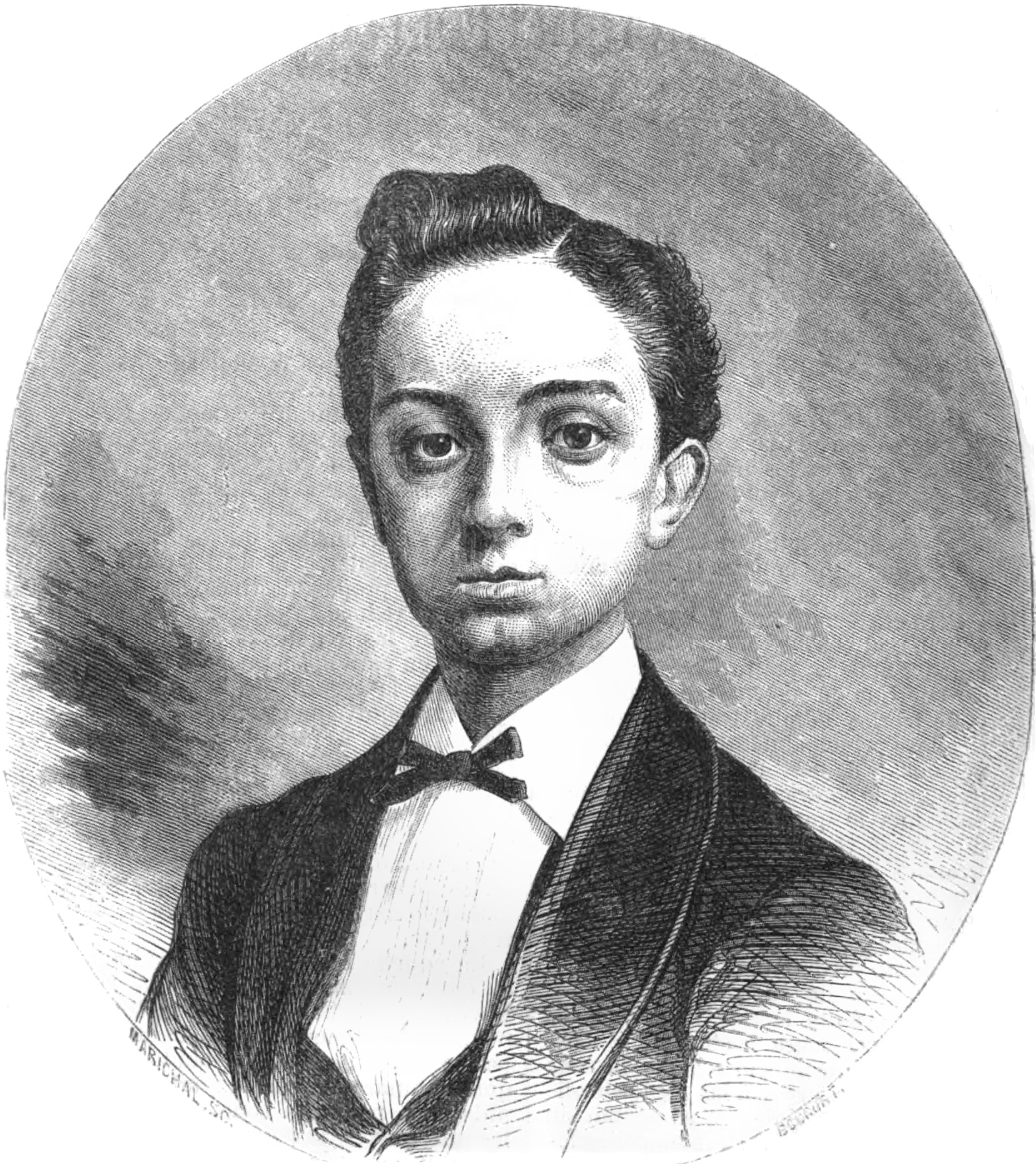 El príncipe de Asturias Alfonso de Borbón (1857-1885), que era el hijo y heredero de la reina Isabel II de España y llegaría a reinar en dicho país como Alfonso XII.